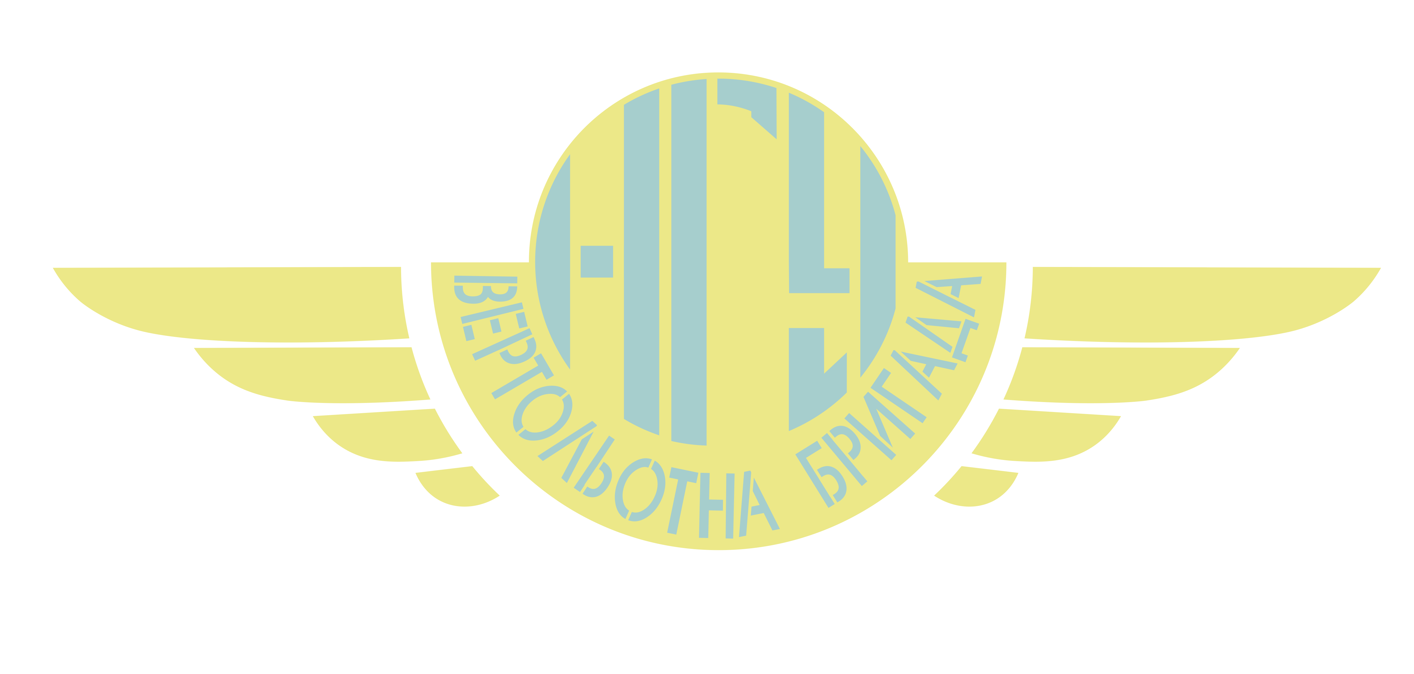 Емблема на Мі-6 зі складу вертолітної бригади НГУ м. Олександрія у 1990-х роках. "Dmytro Sergienko Digital Museum of ukrainian history"